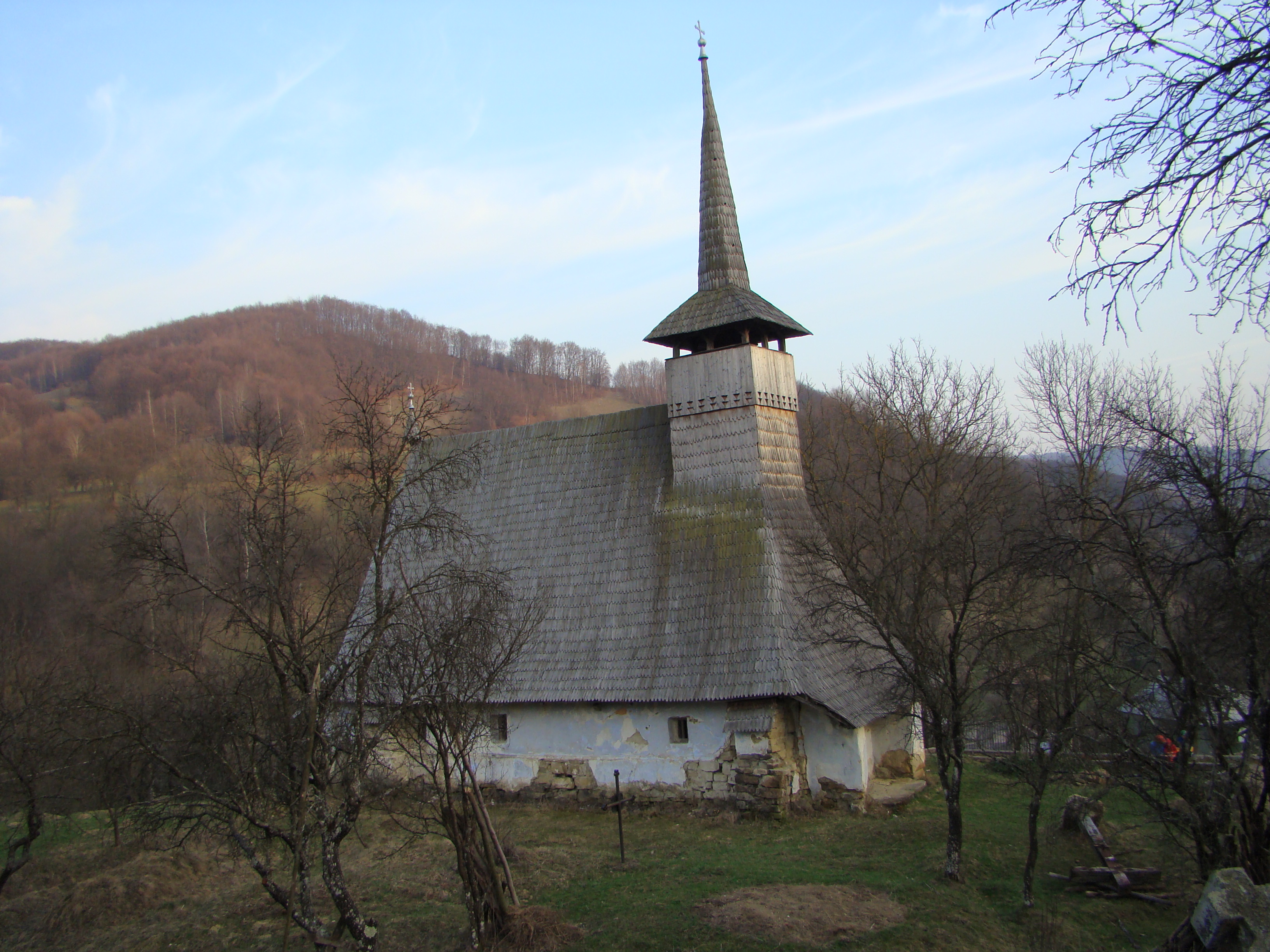 Biserica Sfinţii Arhangheli din Strâmbu, judeţul Cluj.